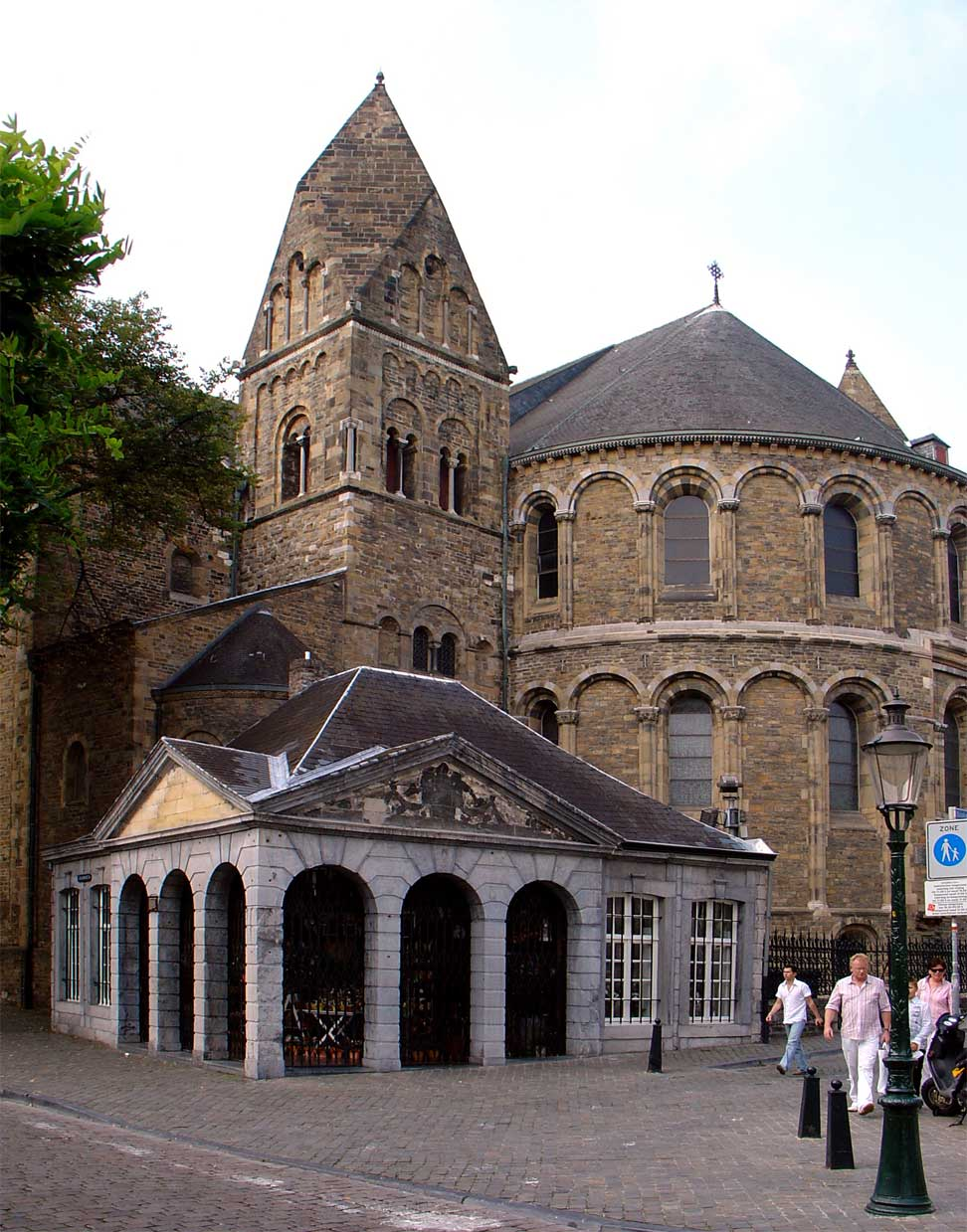 Apsis van Onze Lieve Vrouwekerk in Maastricht